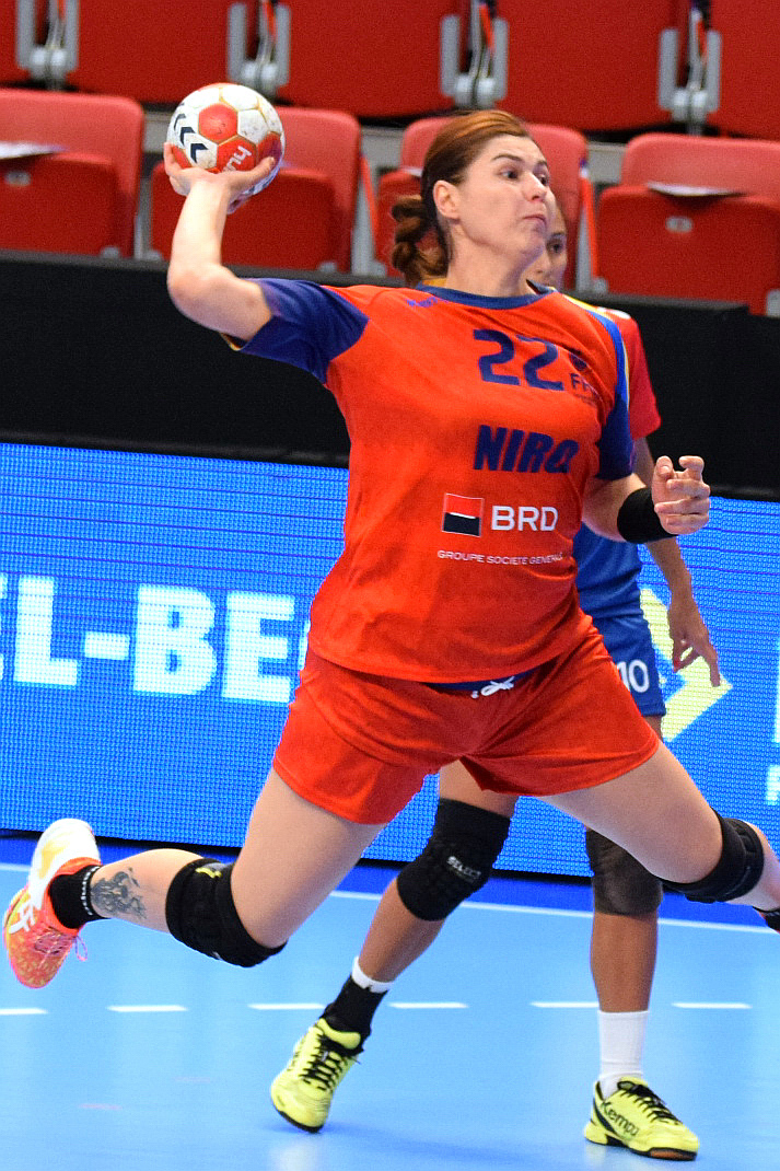 Oana Manea Le 29 novembre 2015, lors du match Roumanie / Cuba pour le compte du TIPIFF 2015. Au stade Pierre de Coubertin à Paris.